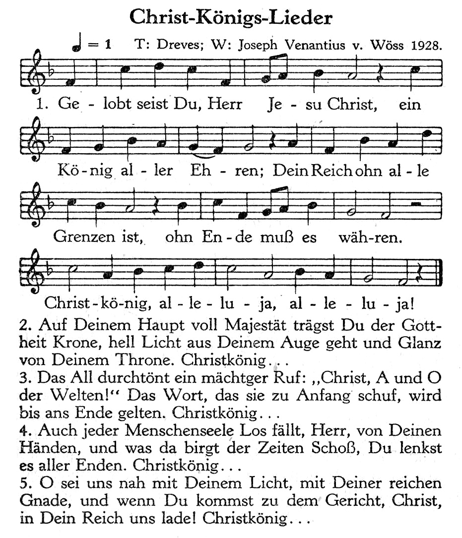 Gelobt seist du, Herr Jesu Christ, Melodie- und Textfassung des Paderborner Gebet- und Gesangbuchs Sursum corda